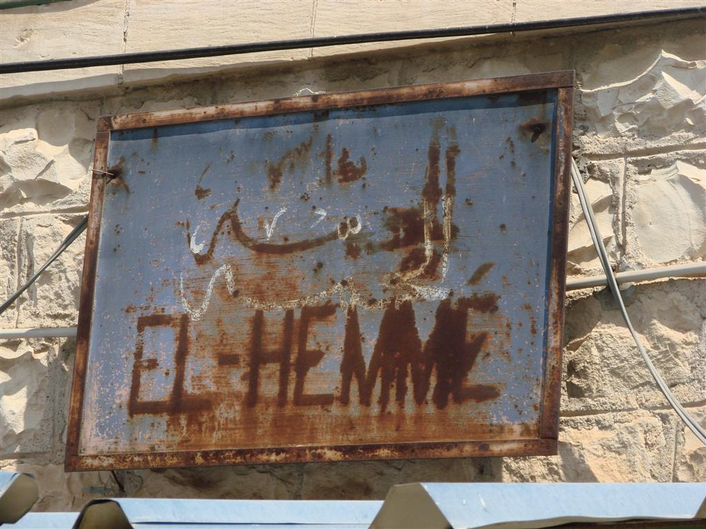 תחנת אל חמה - שלט על בניין ראשי